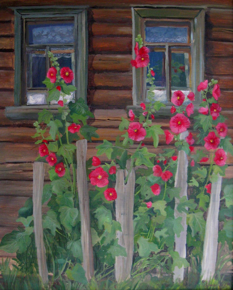 Бабушкины мальвы